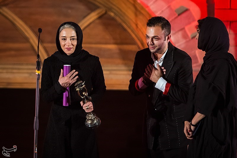 پانته‌آ پناهی‌ها